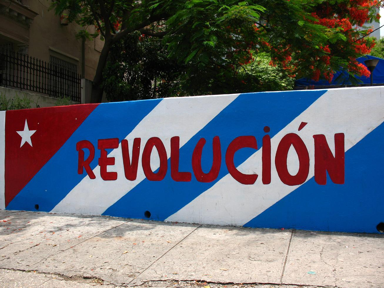 Pintada alusiva a la Revolución cubana en una calle de La Habana